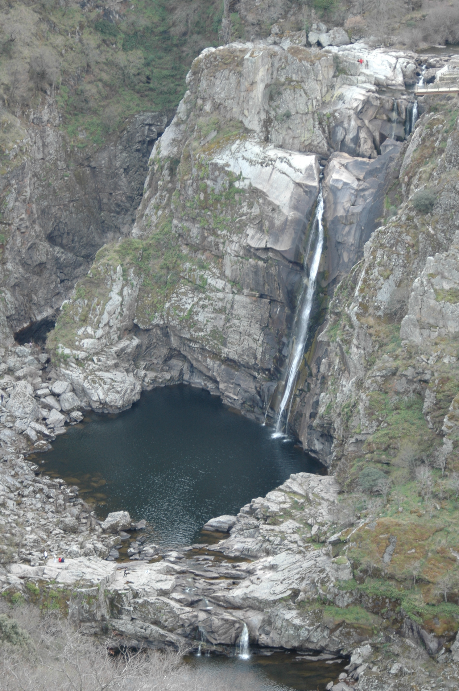 Fotografía de la cascada del Pozo de los Humos situada entre los municipios de Masueco y Pereña de la Ribera (provincia de Salamanca, España) en los Arribes del Duero.